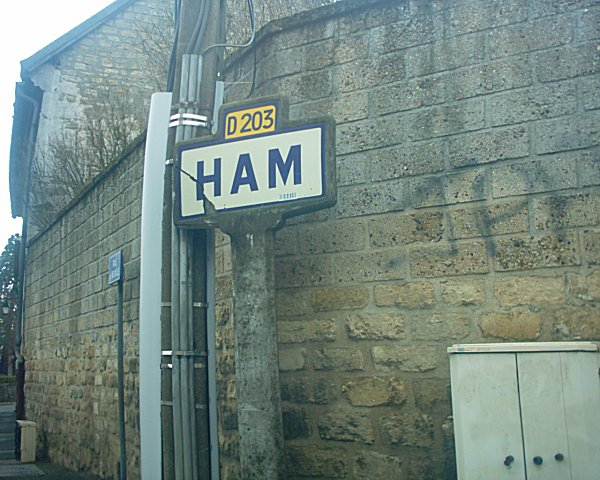 Panneau de Ham on 03/03/06.